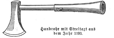 Streitaxt